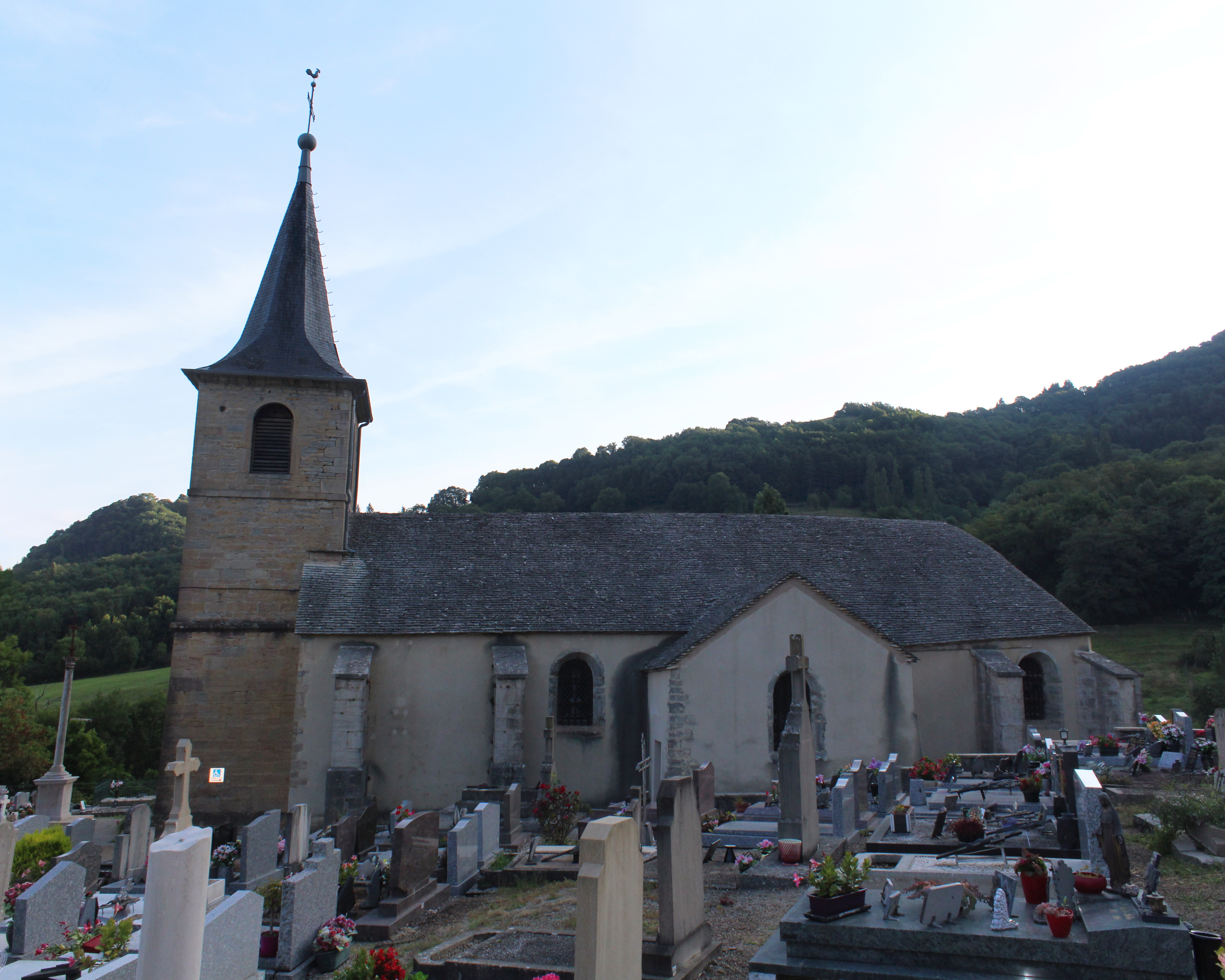 Église Saint-Pierre de Digna.